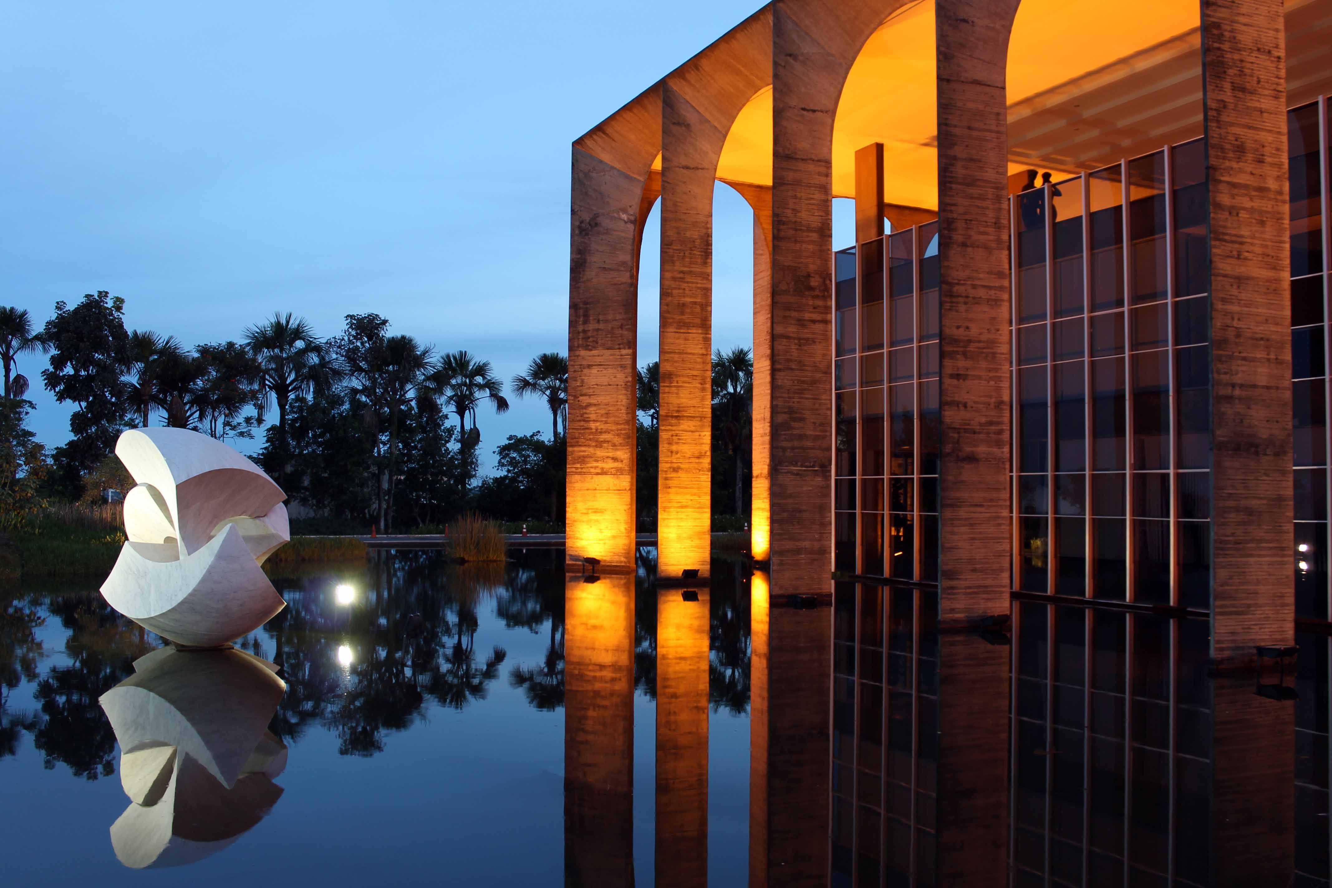 Palácio do Ministério das Relações Exteriores do Brasil. Também conhecido como "Palácio dos Arcos", obra do arquiteto Oscar Niemeyer. Escultura em mármore "Meteor" de Alfredo Ceschiatti.